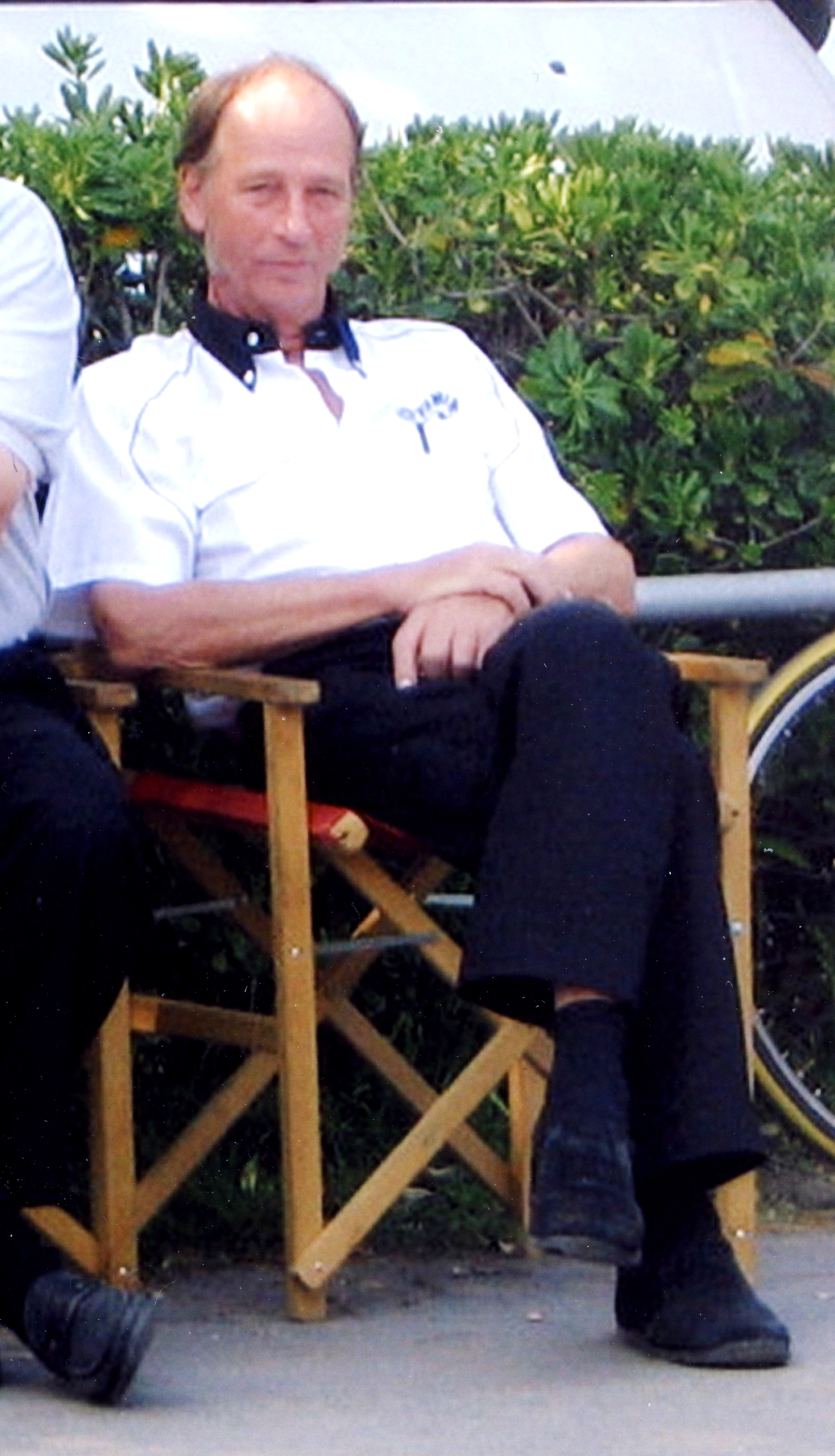 Kent Andersson a Rimini in occasione del Pasolini Day del 2005